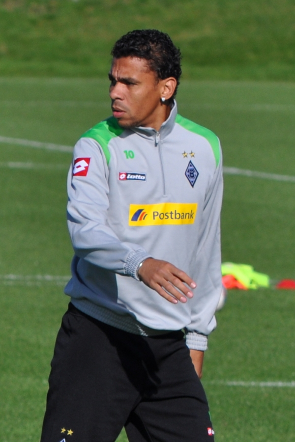 Igor de Camargo beim Training